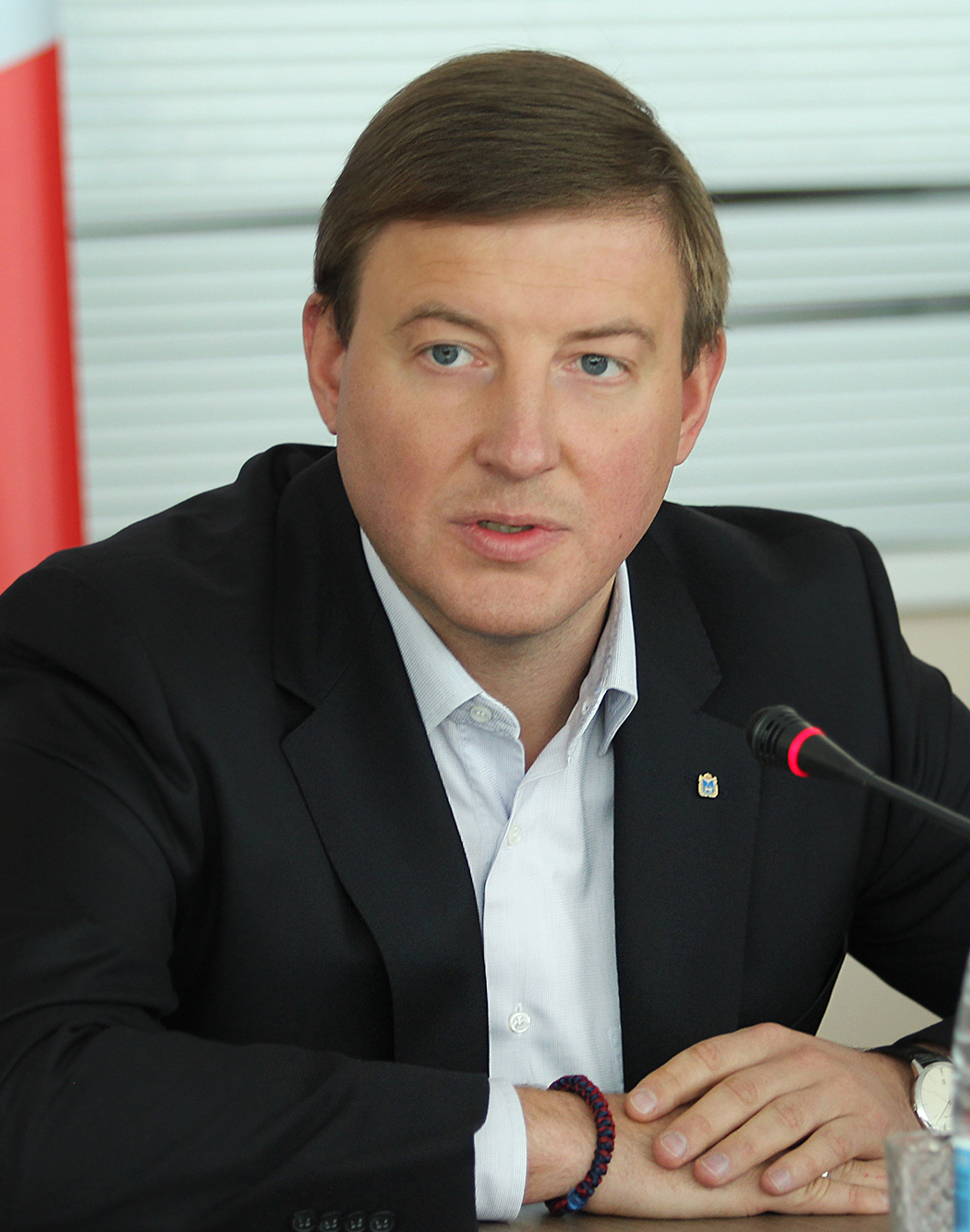 A.A. Turchak